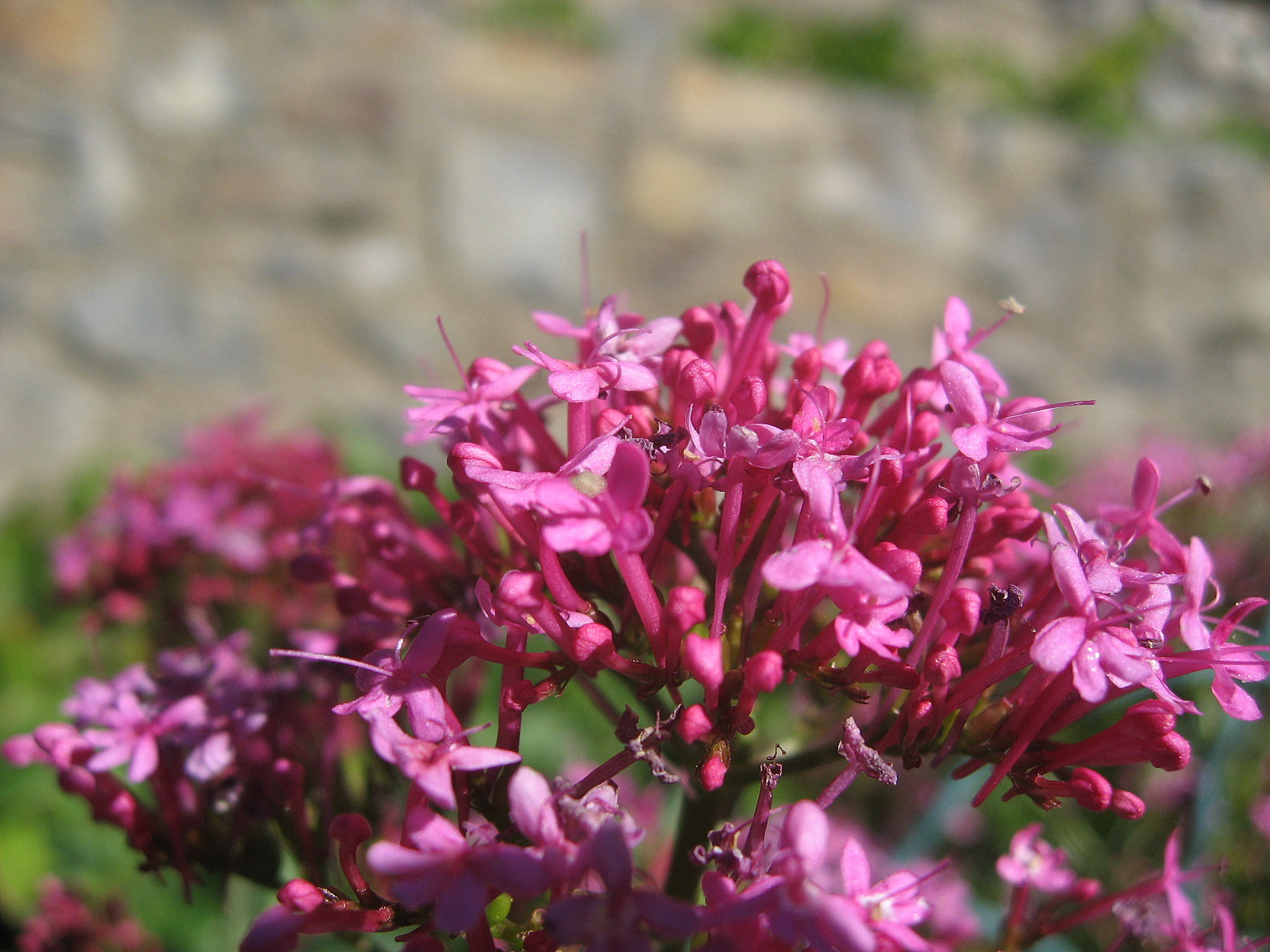 Rote Spornblume (Centranthus ruber), Blüten